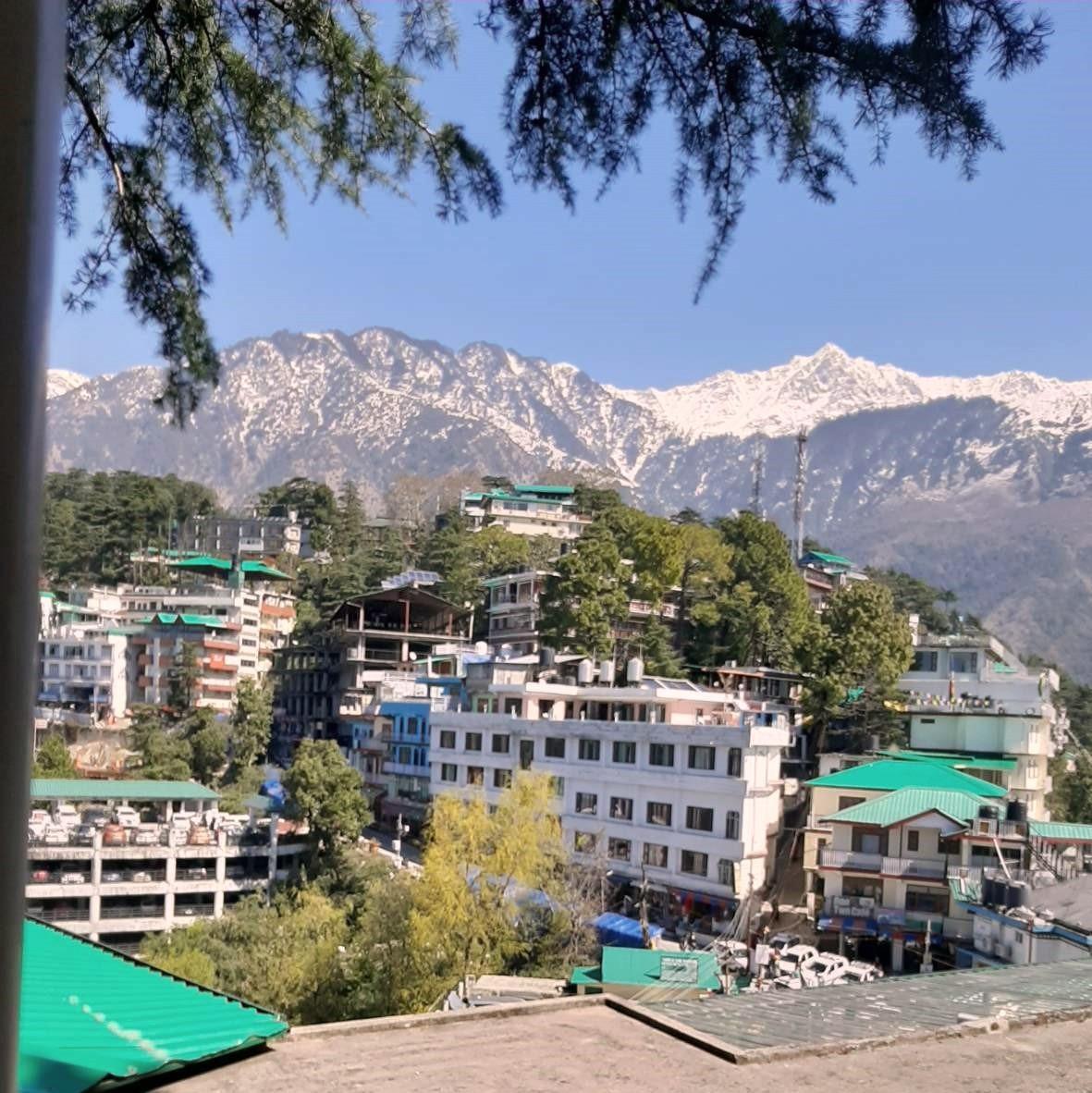 Residential neighborhoods of Dharamsala on the background of the Himalayas